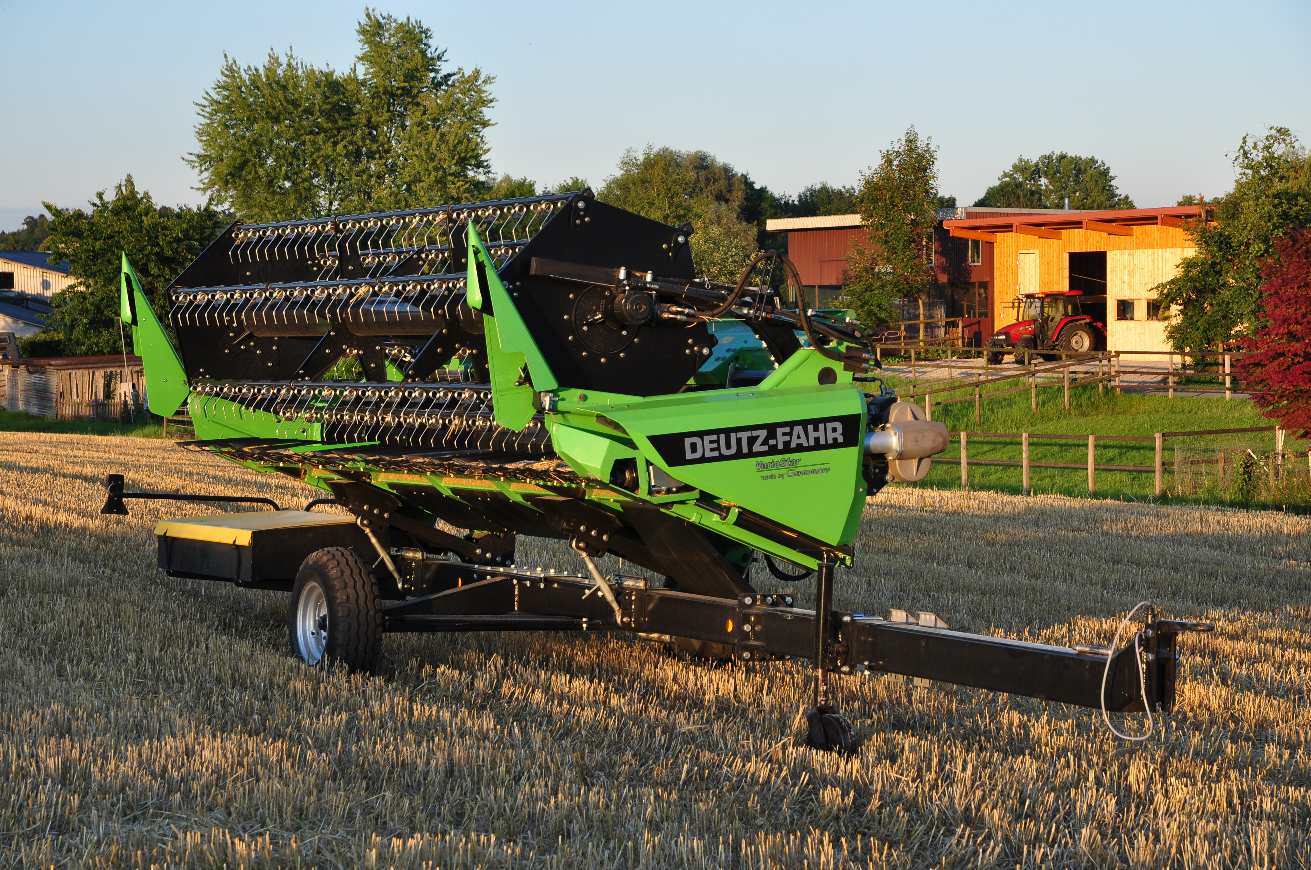 Deutz-Fahr 'VarioStar' (Geringhoff-Schneidwerk eines Deutz-Fahr-Mähdreschers auf Schneidwerkwagen), Zürich-Affoltern (Switzerland)